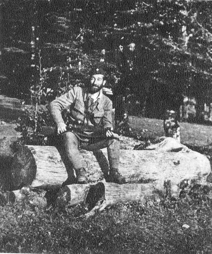 Srpskohrvatski / српскохрватски: Pop Vlada Zečević u bivaku kod Mliništa, septembra 1942.